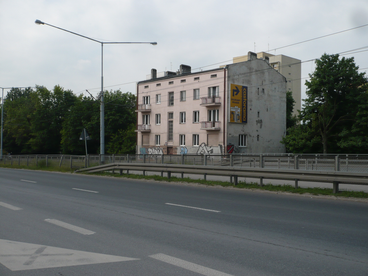 W tym domu mieszkała w latach 196 ? - 1986 I sekretarz Komitetu Łódzkiego Polskiej Zjednoczonej Partii Robotniczej (PZPR) - Michalina Tatarkówna-Majkowska. Testamentem przekazała swoje mieszkanie na rzecz oddz. łódzkiego Tow. Przyjaciół Dzieci.